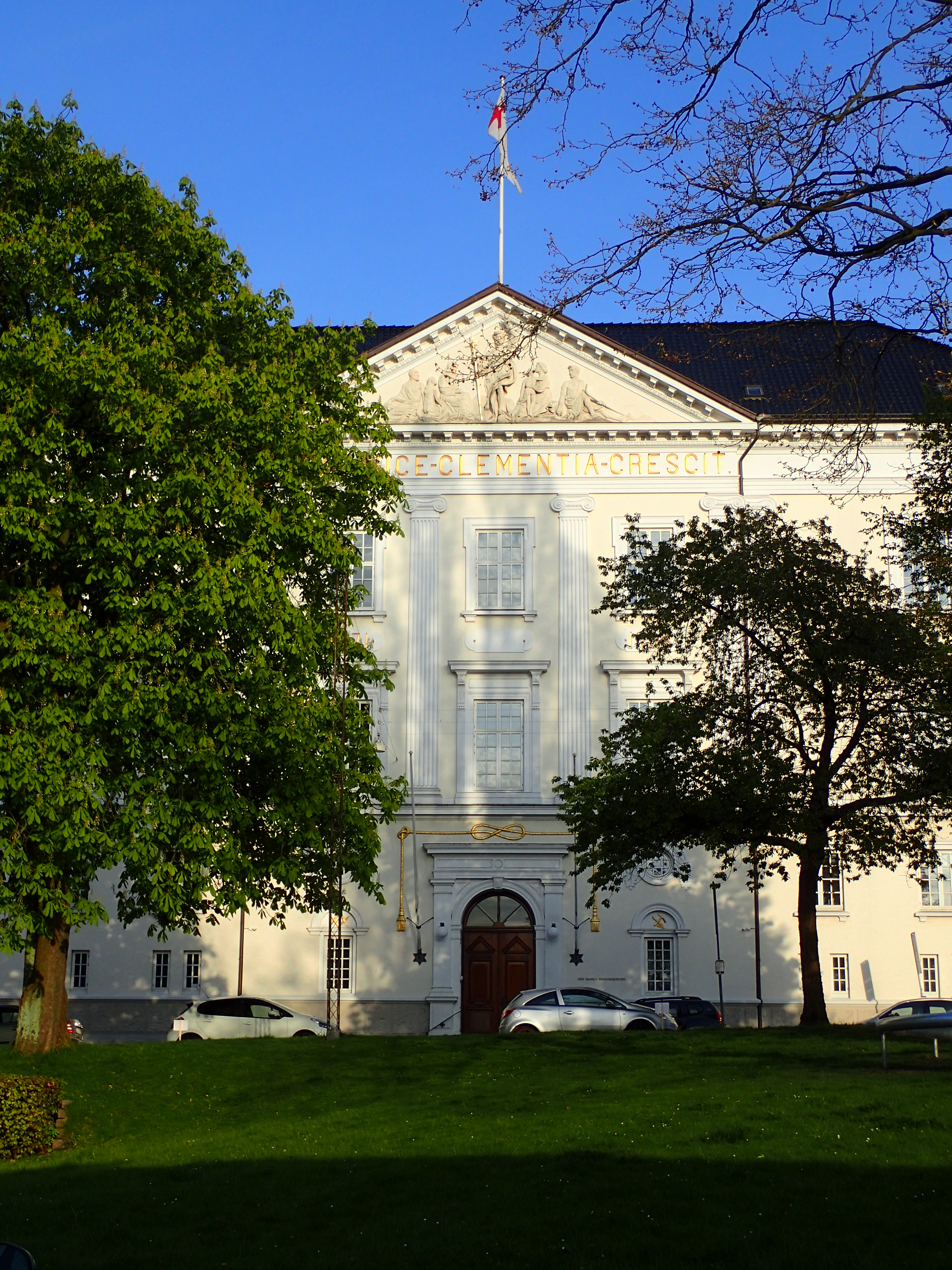 Logebygningen i Christiansgade. Frimurerlogen i Danmark.